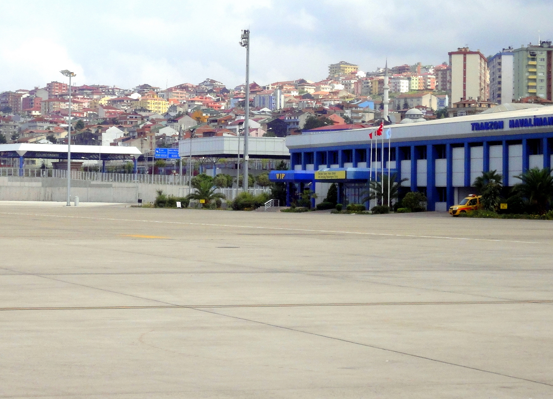 Port lotniczy